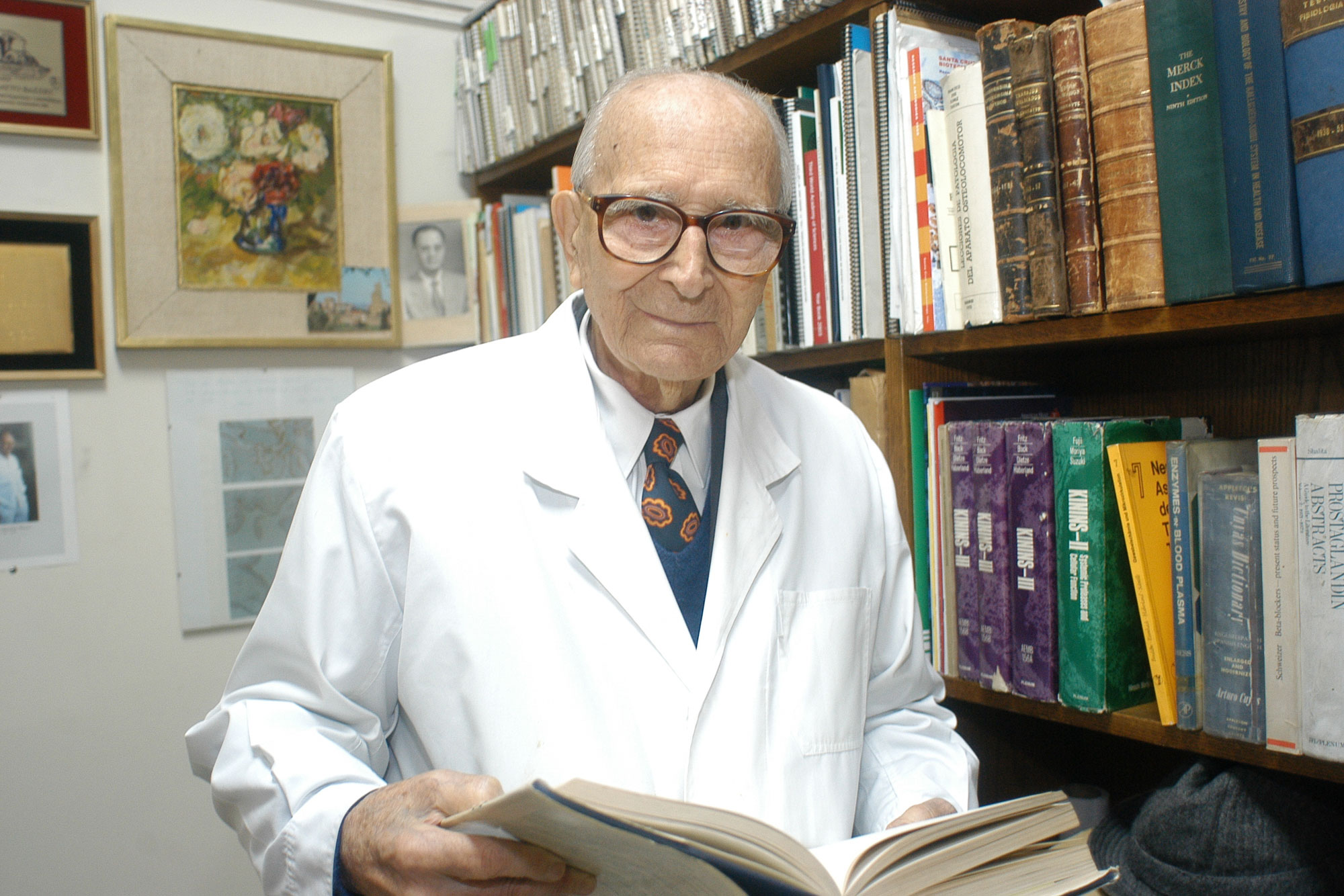 El científico fue formador de generaciones de médicos e investigadores. Su legado se extiende en las áreas de la fisiología, biología, bioquímica, inmunología y endocrinología, así como en el estudio del sistema renal y de la hipertensión arterial.